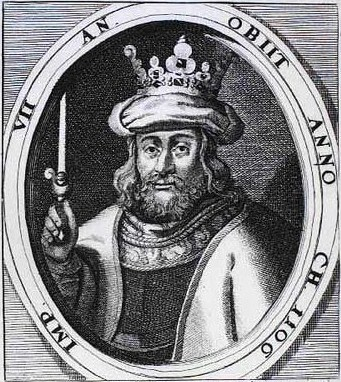 Erik 1. Ejegod. Det Kongelige Bibliotek. Billedet er langt senere end kongens levetid, så det kan ikke tages som et objektivt udtryk for, hvordan han har set ud.